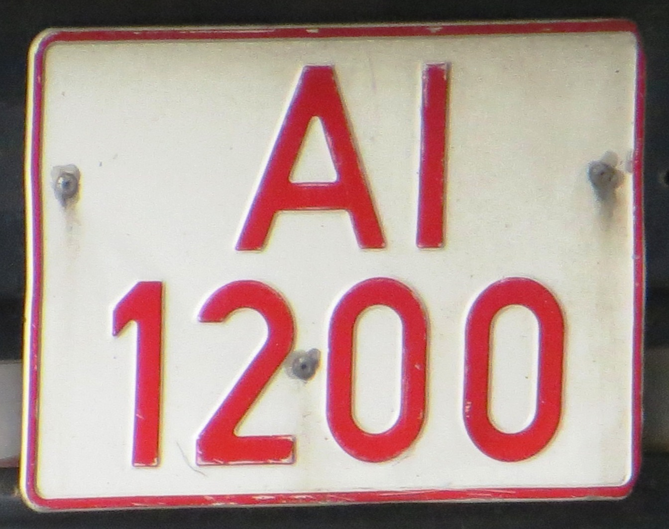 kentekenplaat uit Wit Rusland (Belarus)